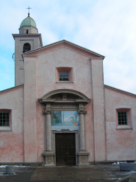 Church SS. Quirico e Giulitta, Melide, Switzerland.